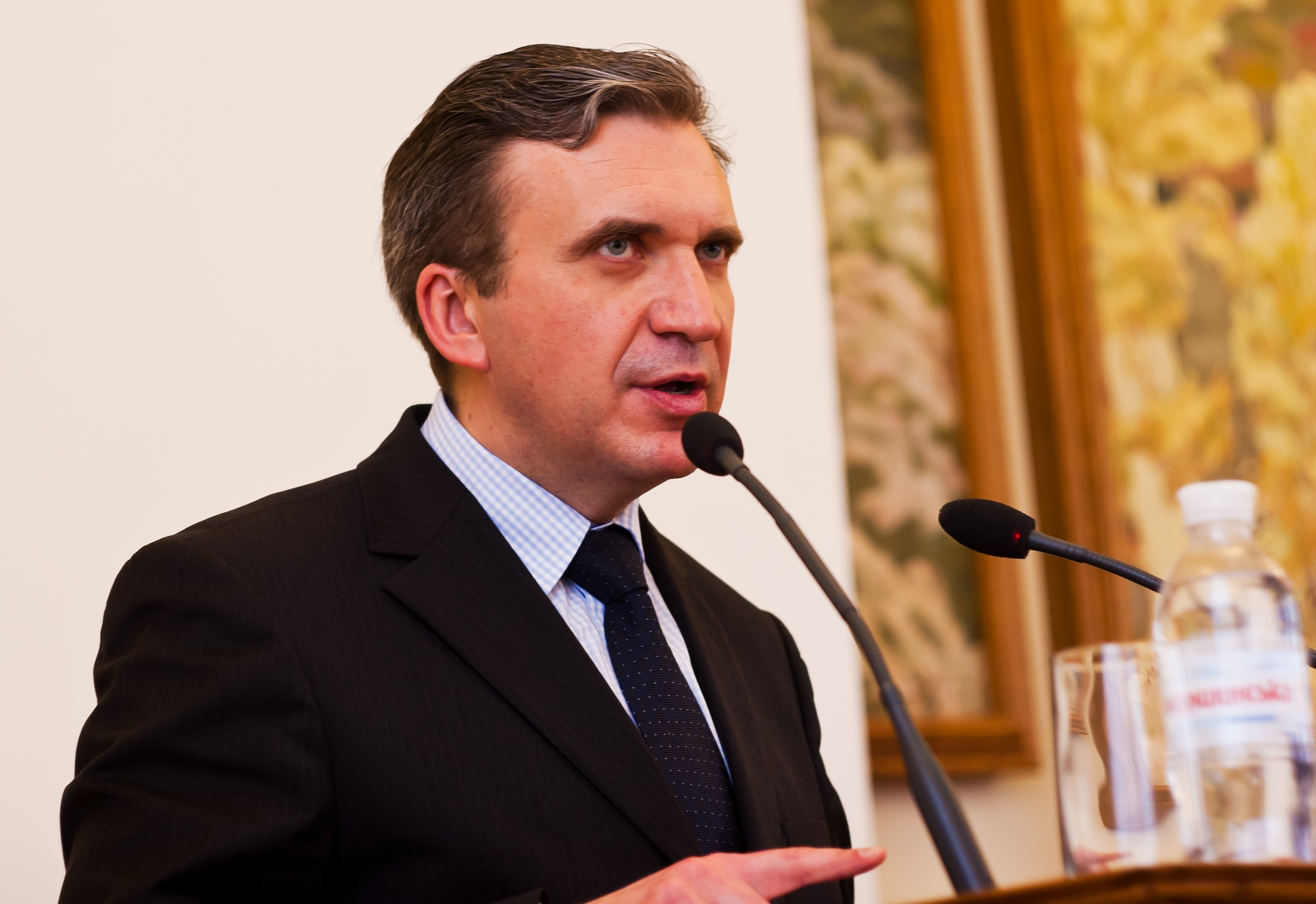 Міністр економічного розвитку і торгівлі України та голова КШЕ.